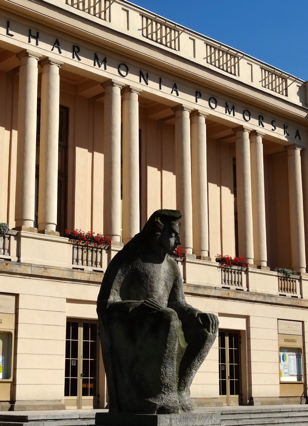 Rzeźba Fryderyka Chopina stojąca przed frontem Filharmonii Pomorskiej w Bydgoszczy